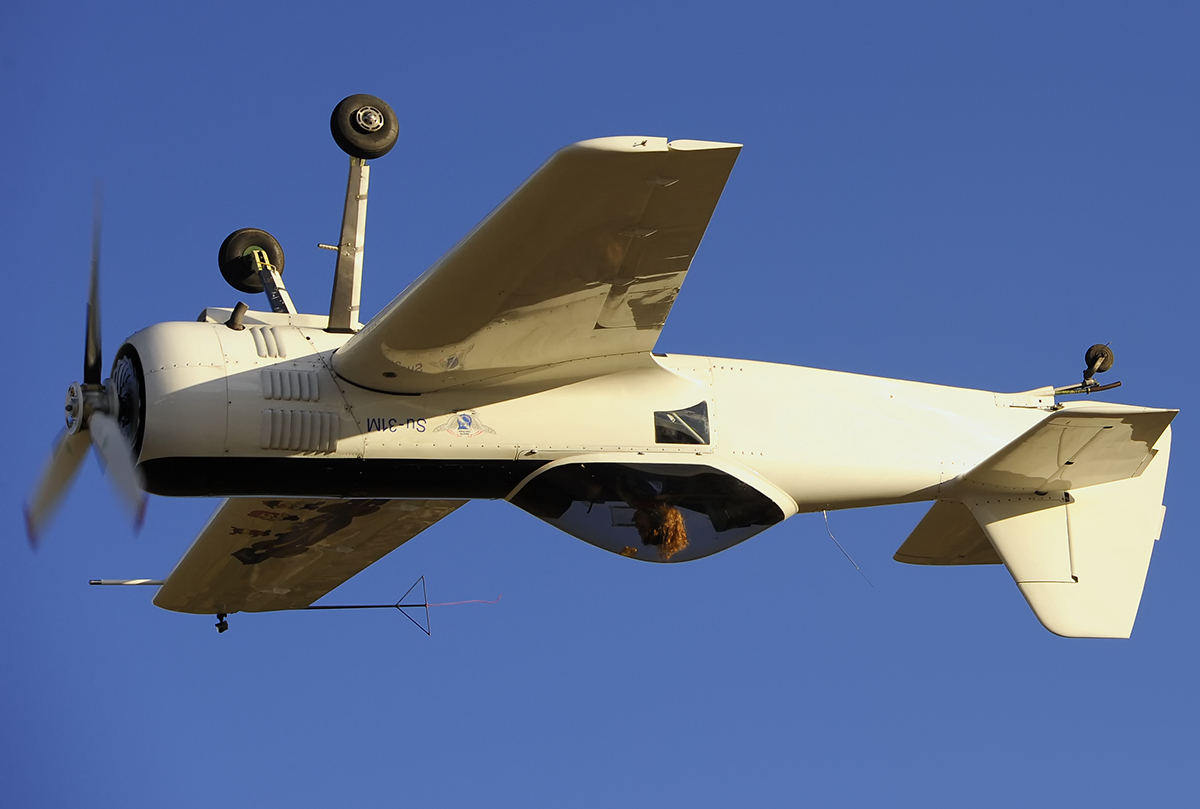 Svetlana Kapanina in flight!